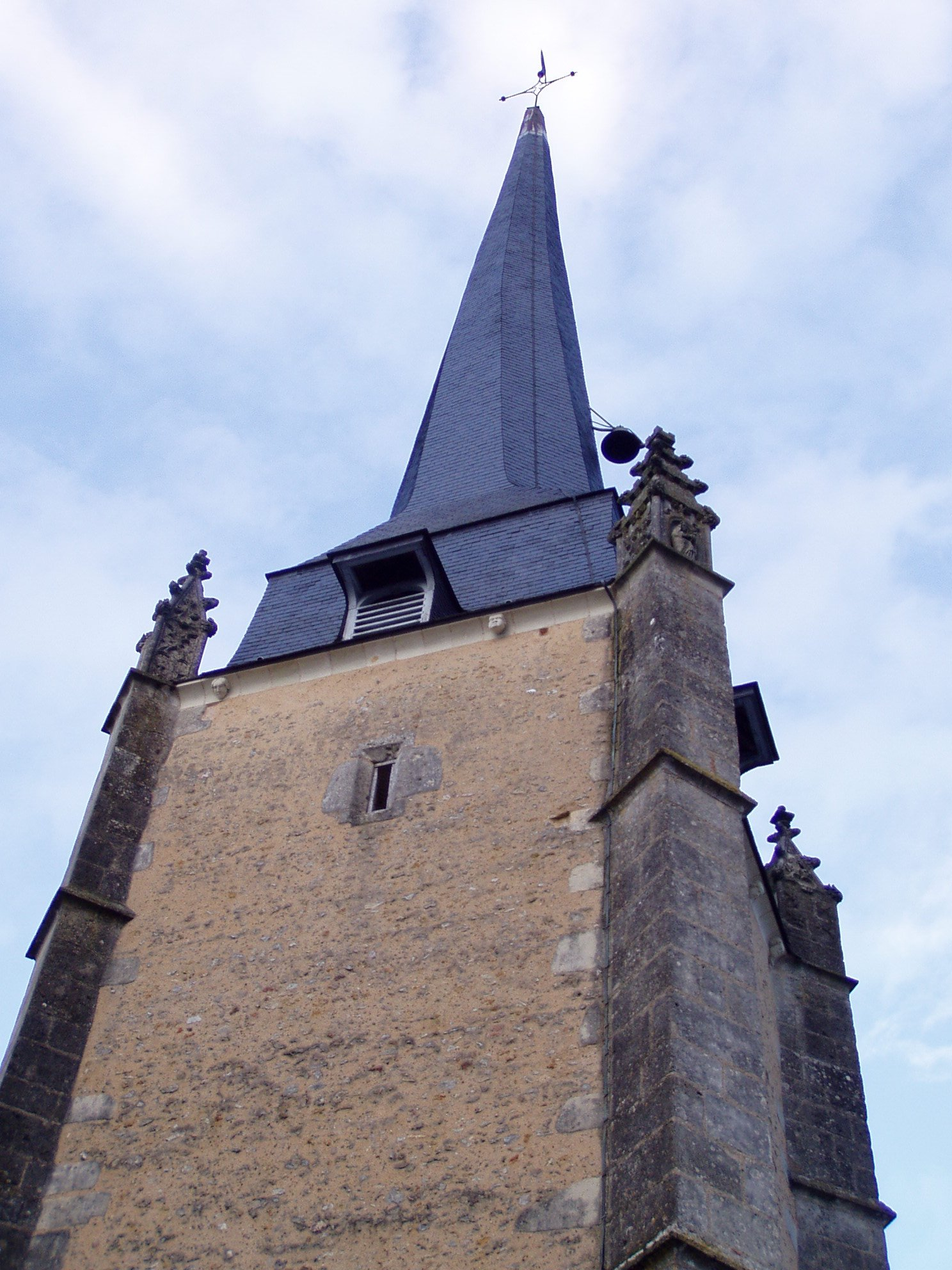 Clocher tors de l'église de Marçon